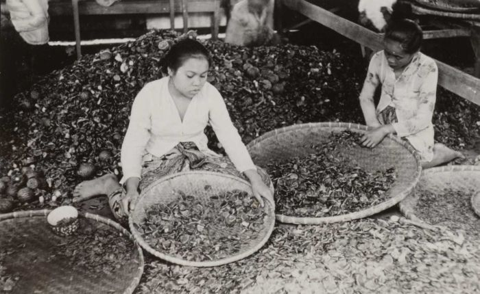 Foto. Het sorteren van het zaad van een damarboom (Agathis alba), West-Preanger